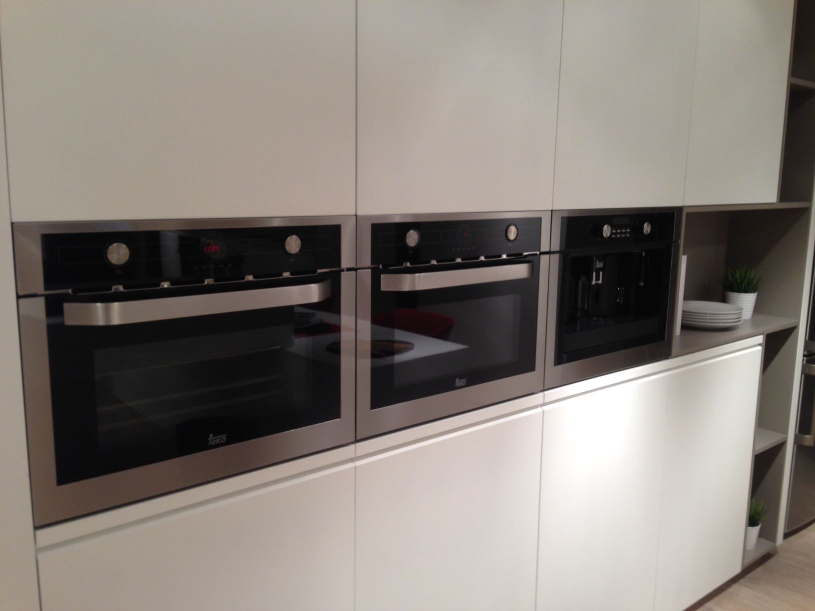 Hornos y cafetera Teka